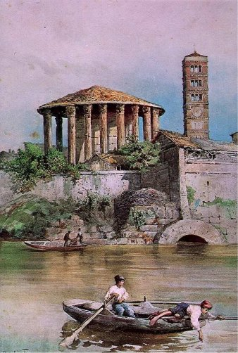 Sbocco della Cloaca Massima in Rome (rione Ripa)